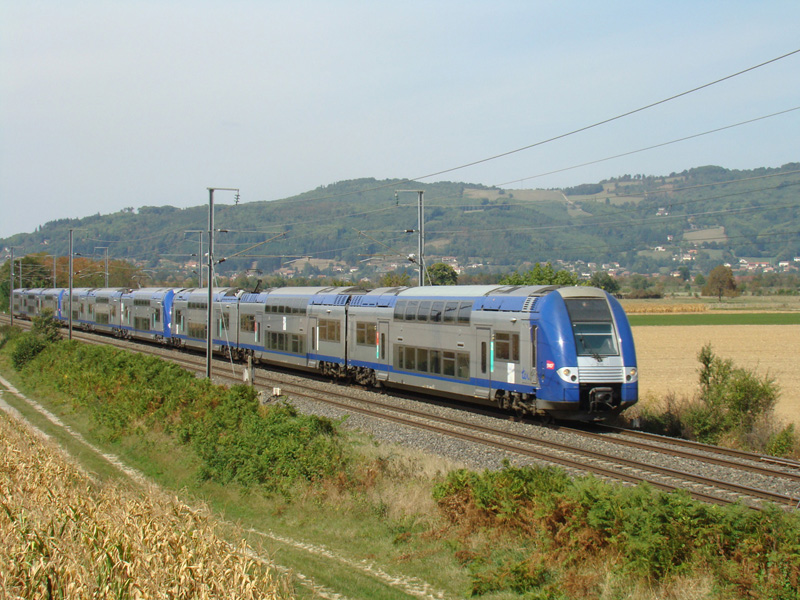 une triplette de Z.24500 venant de Lyon et en direction de Grenoble